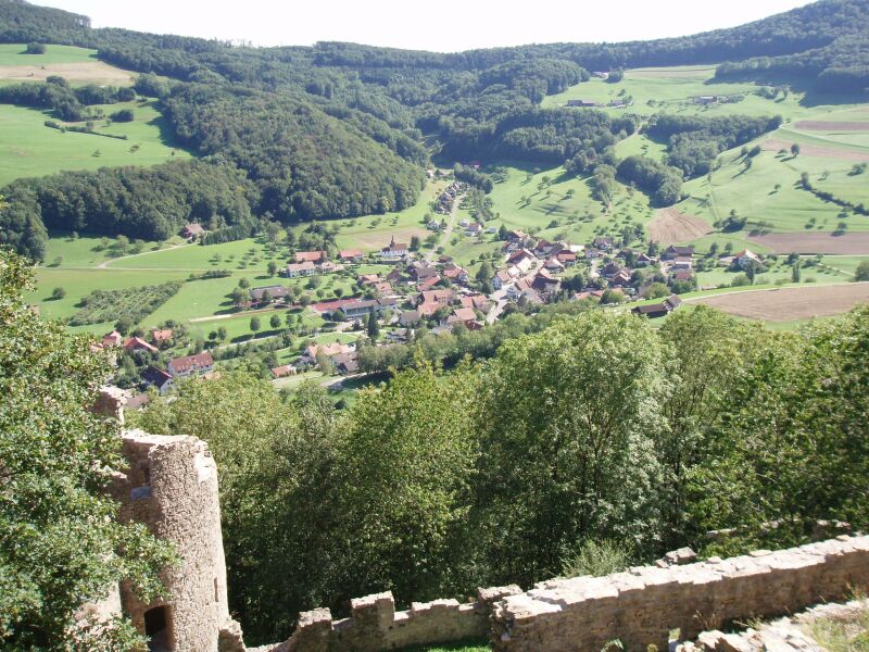 Blick von der Ruine Schenkenberg auf Thalheim, Schweiz